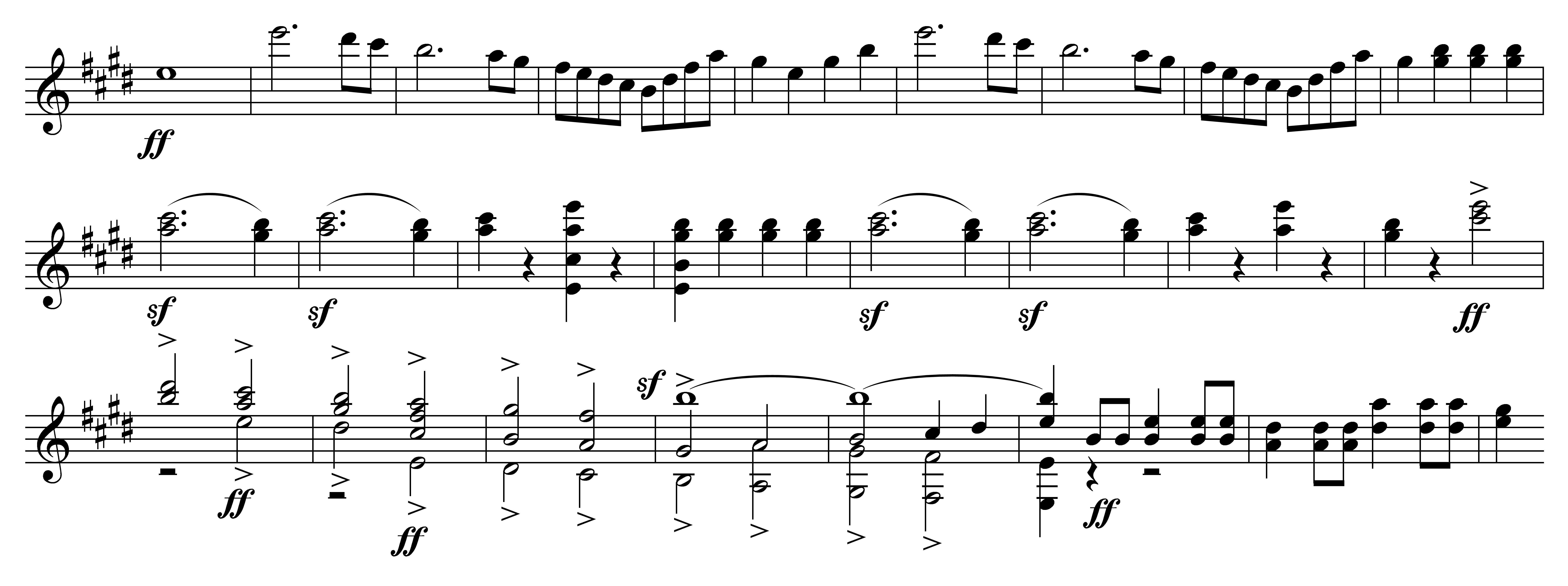 Notenbeispiel Mendelssohn Sommernachtstraum - Festmusik T.